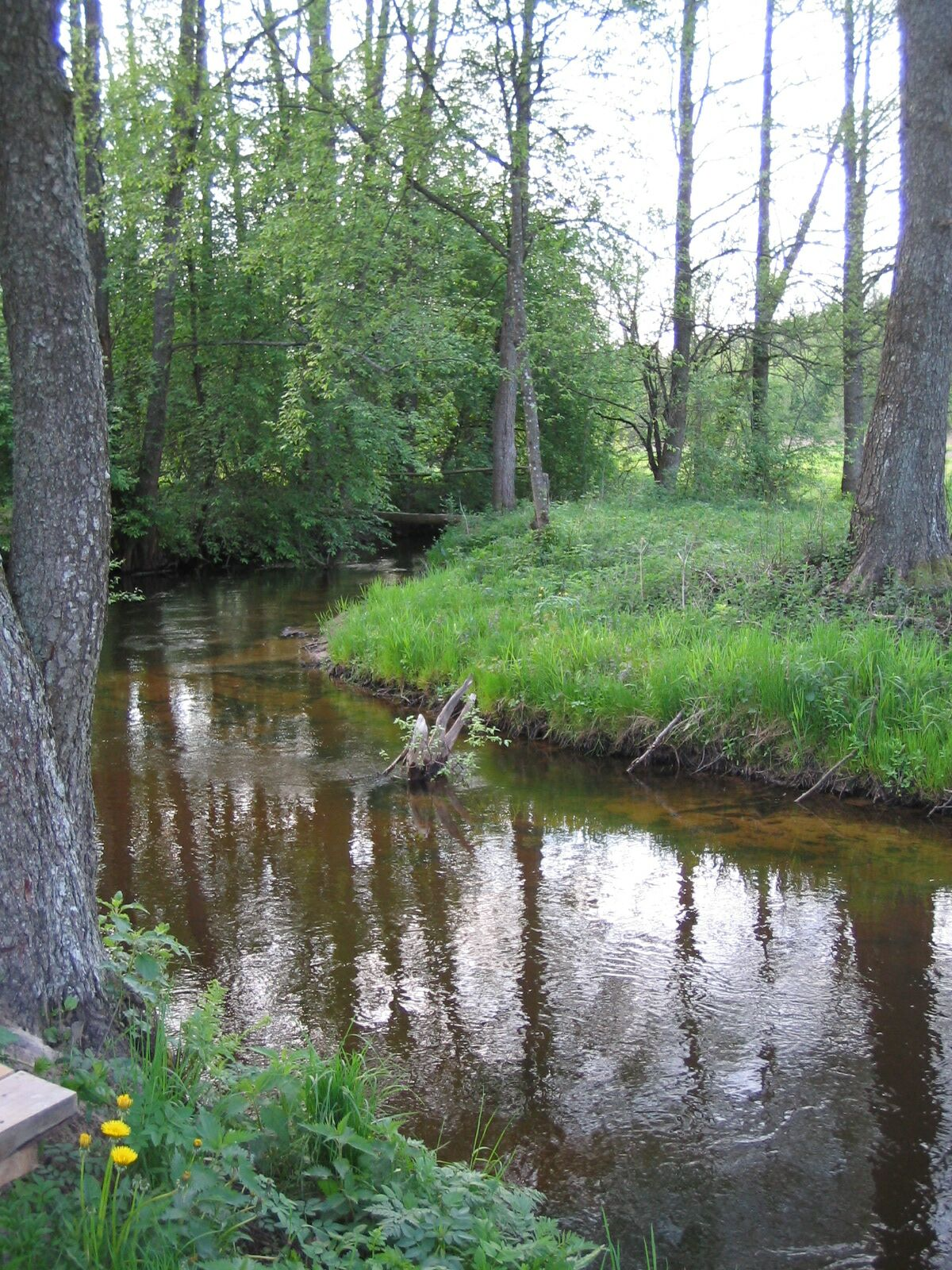 Grūda ties Kašėtomis (Marcinkonių sen.).